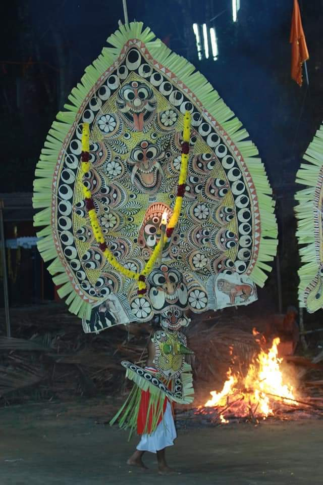 കോട്ടയം ജില്ലയിലെ പടയണി ഗ്രാമമായ ആലപ്ര തച്ചരിക്കൽ ശ്രീഭദ്രകാളി ദേവി ക്ഷേത്രത്തിൽ ശ്രീഭദ്ര പടയണി സംഘത്തിലെ കലാകാരൻ ഭൈരവിക്കോലം പടയണിക്കളത്തിൽ തുള്ളുന്നു